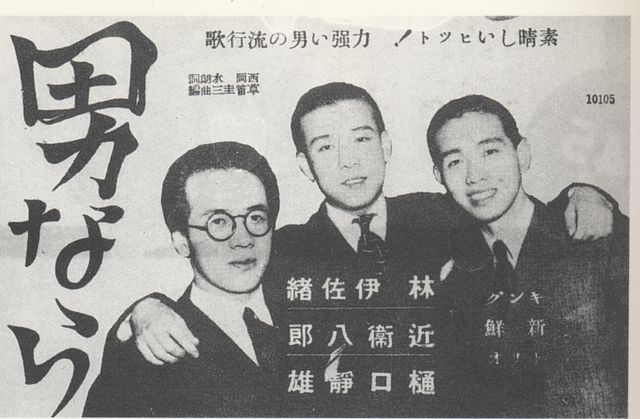 1937年発売の「男なら」宣伝用ポスターをスキャン